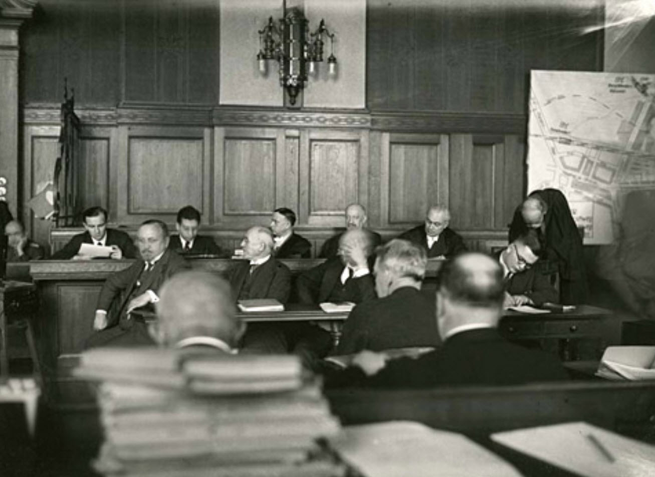 Foto aus einem der aufwändigsten Strafprozesse der 1930er Jahre, dem Caro-Petschek-Prozess. Im Hintergrund die prominent besetzte Verteidigerbank: Ganz rechts (vorgebeugt) Wolfgang Heine, neben ihm Rudolf Dix, dann der Angeklagte Nicodemus Caro und (nach rechts blickend) Max Alsberg. Er dauerte vom 6. Juni bis zum 23. Dezember 1932 und endete mit Caros Freispruch. LA Berlin F. Rep. 29-02-06 Nr. 237/1.